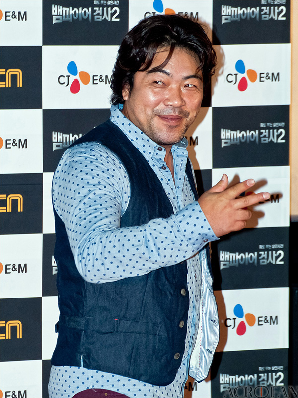 OCN 뱀파이어검사 시즌 2 시사회 및 제작발표회에 참석한 이원종